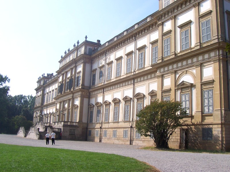 Monza - Villa Reale (Facciata posteriore)